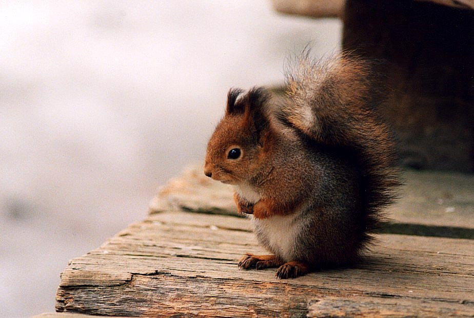 A little european squirrel (Sciurus vulgaris) sitting on bench.